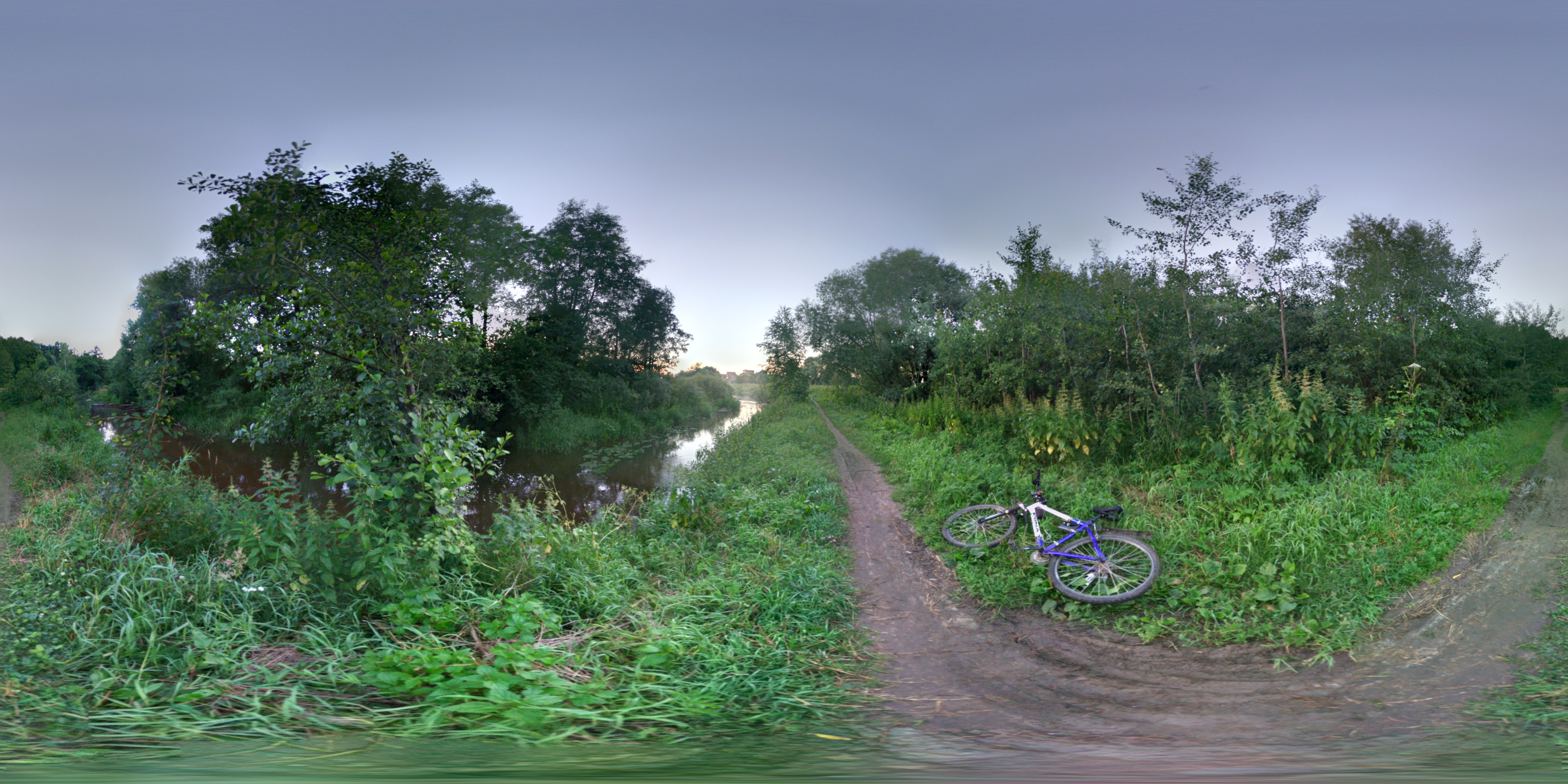 Старково, река Гжелка. Раменский район Московской области